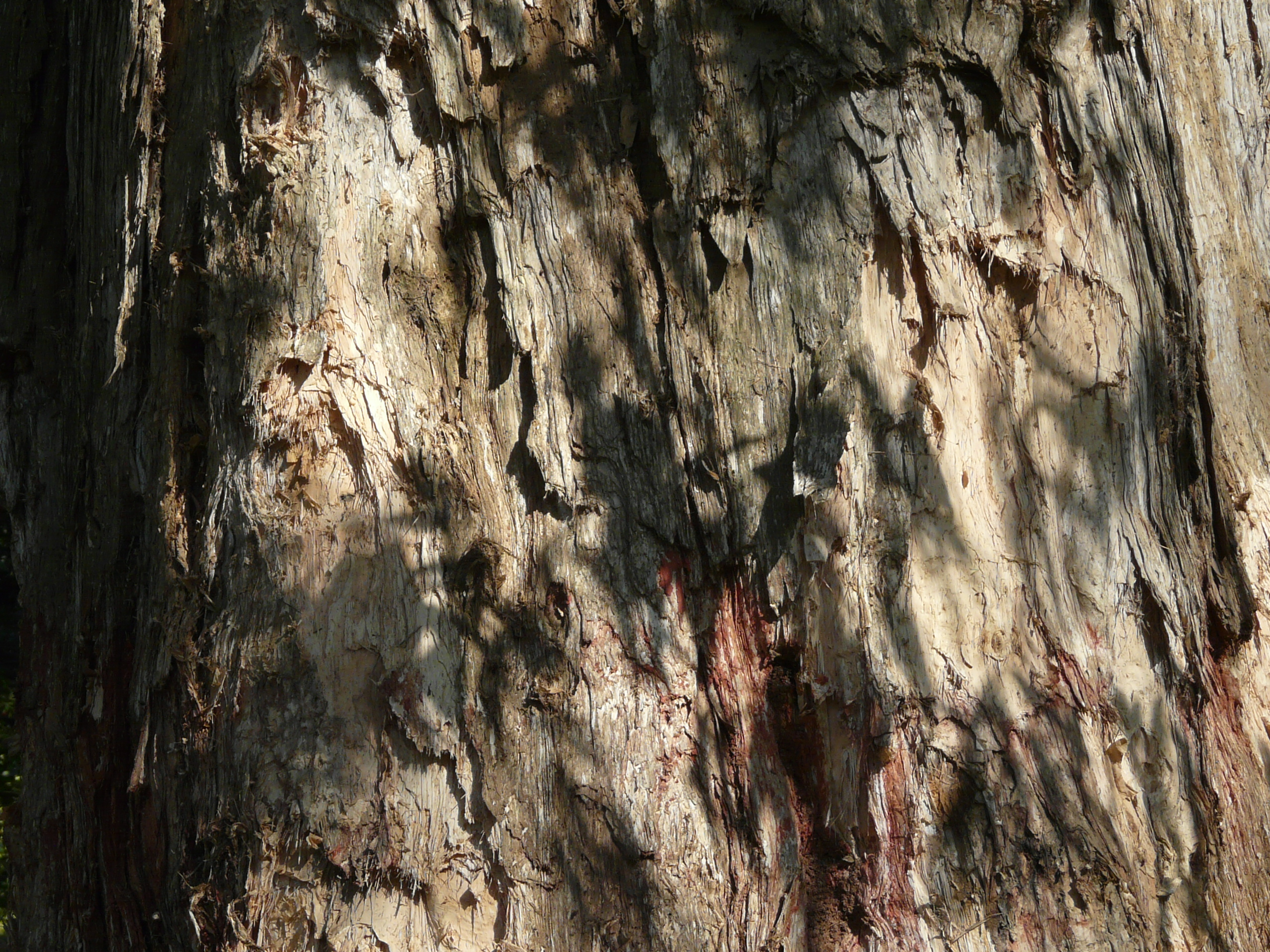 Melaleuca leucadendron